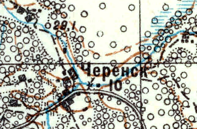 Топографическая карта Ленинградской области, квадрат VIc-27 (Залустижье), деревня Черенское